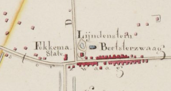 Detail Kadastrale kaart 1811-1832 Beetsterzwaag